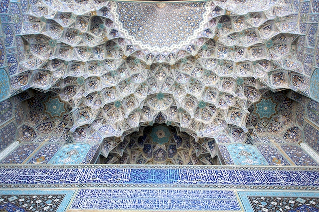 Imam Mosque (Masjed-e Imam), Esfahan, Iran